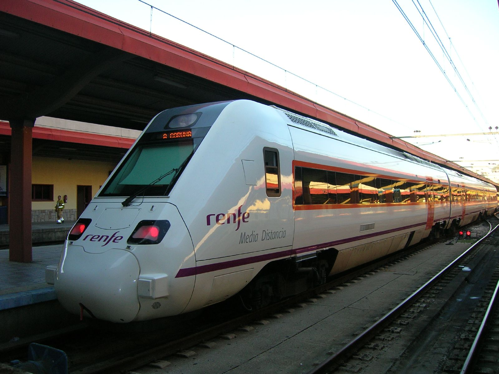 Regional Serie R-598.